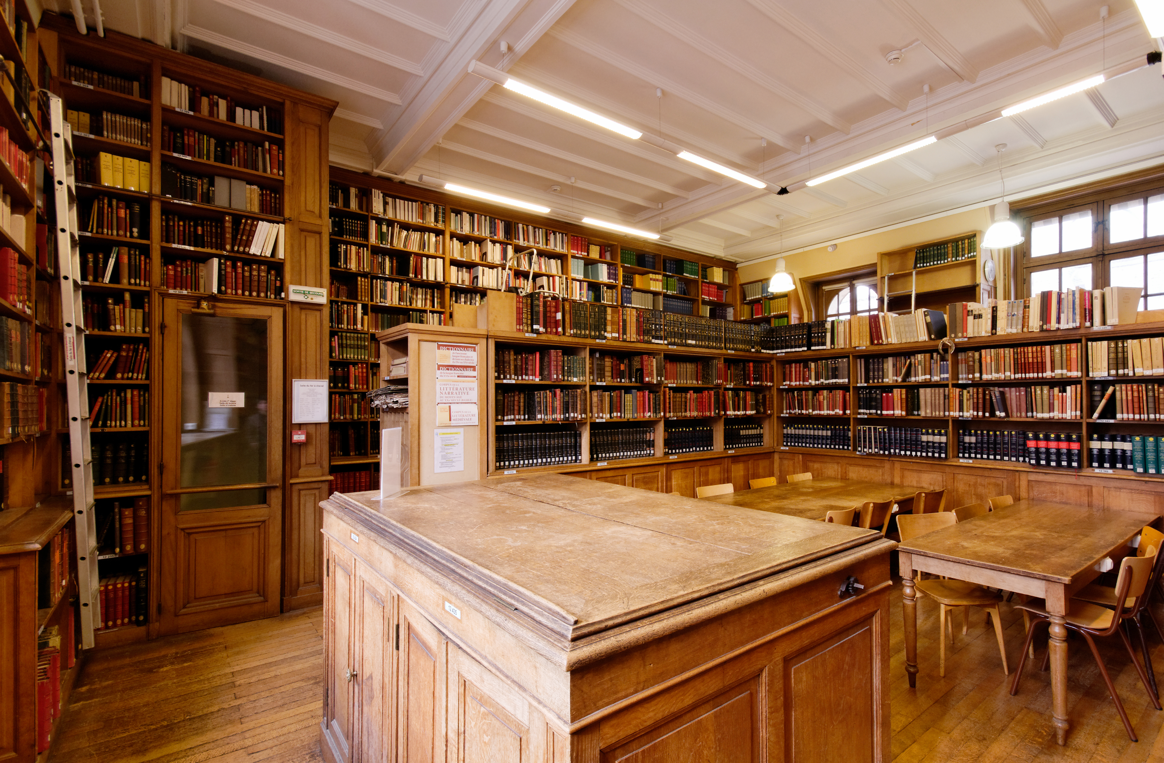 Salle dite du fer à cheval, bibliothèque de l'École nationale des Chartes.